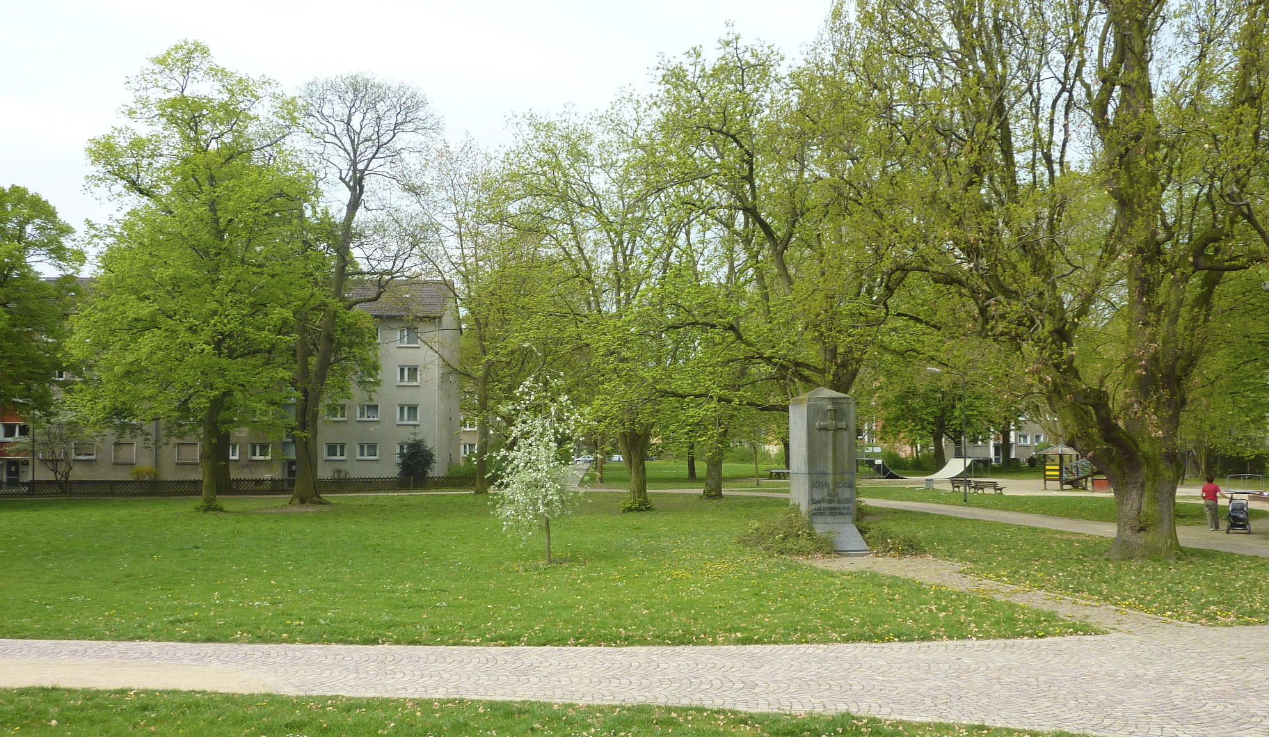 Frankfurt am Main, Stadtteil Unterliederbach: Der Graubnerpark ist eine öffentliche Grünanlage im Norden des Stadtteils. Der Park ging aus einem 1817 eingerichteten privaten Landschaftspark hervor. Die Stadt Höchst am Main, seit 1928 Frankfurt-Höchst, kaufte die Liegenschaft gleichzeitig mit der Eingemeindung Unterliederbachs nach Höchst im Jahr 1917 auf und widmete das Grundstück in einen öffentlichen Park um. Das Foto zeigt eine Panorama-Ansicht vom nördlichen Teil des Parks, Ansicht von Norden. In der rechten Bildhälfte das im Park stehende Mahnmal